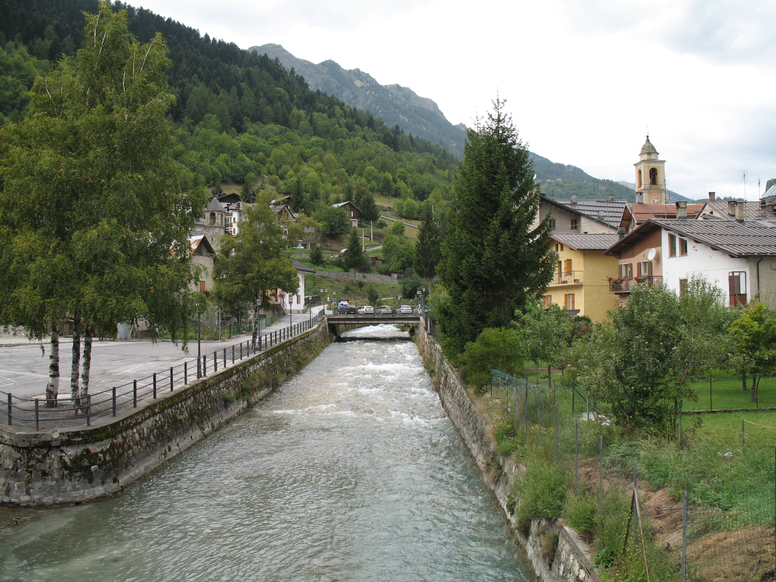 Immagine da Pietraporzio, valle Stura di Demonte, in provincia di Cuneo, Piemonte, Italia